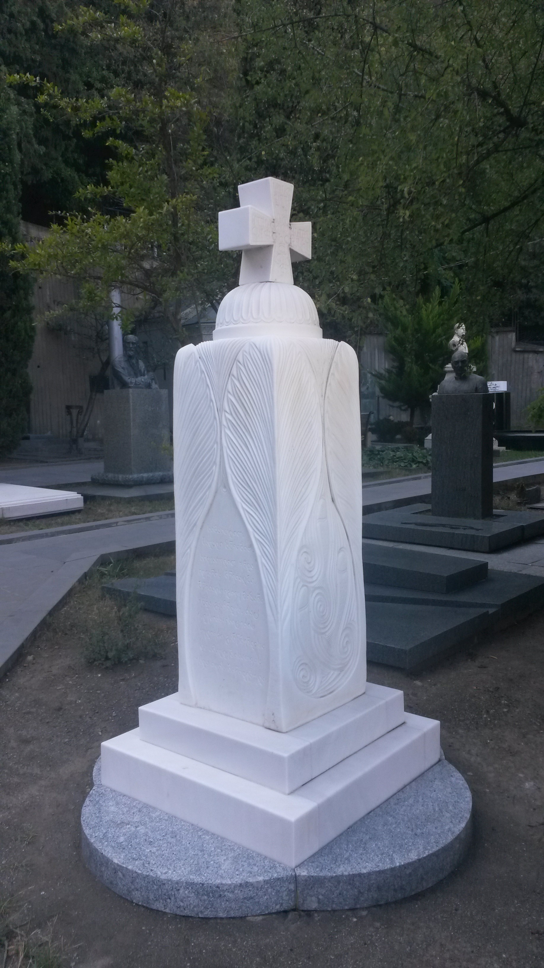 მთაწმინდის პანთეონი